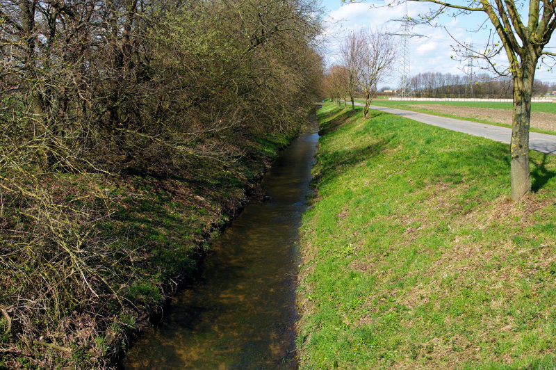 Das Foto zeigt den Bach "Geinegge" in Hamm-Bockum-Hövel am Klosterhof.